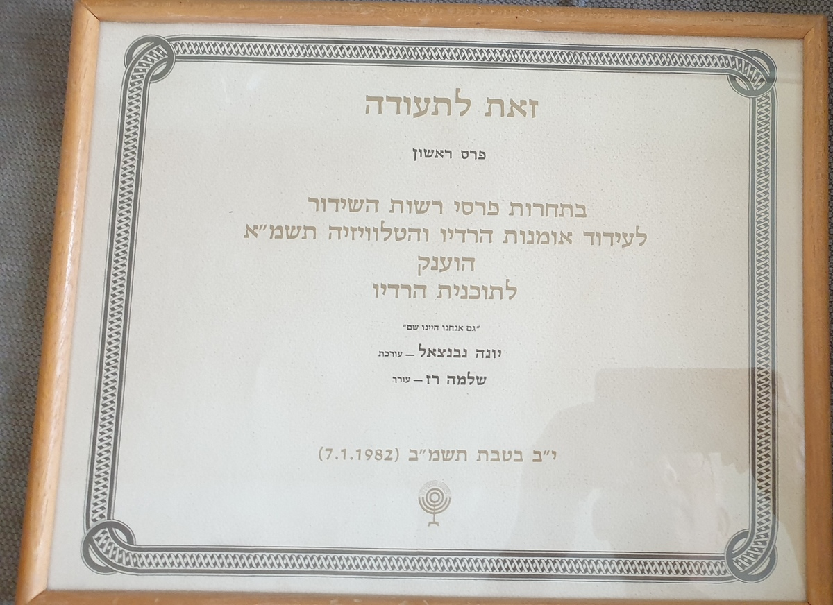 תעודה המעידה על זכייתו של שלמה רז בתחרות פרסי רשות השידור, 1982